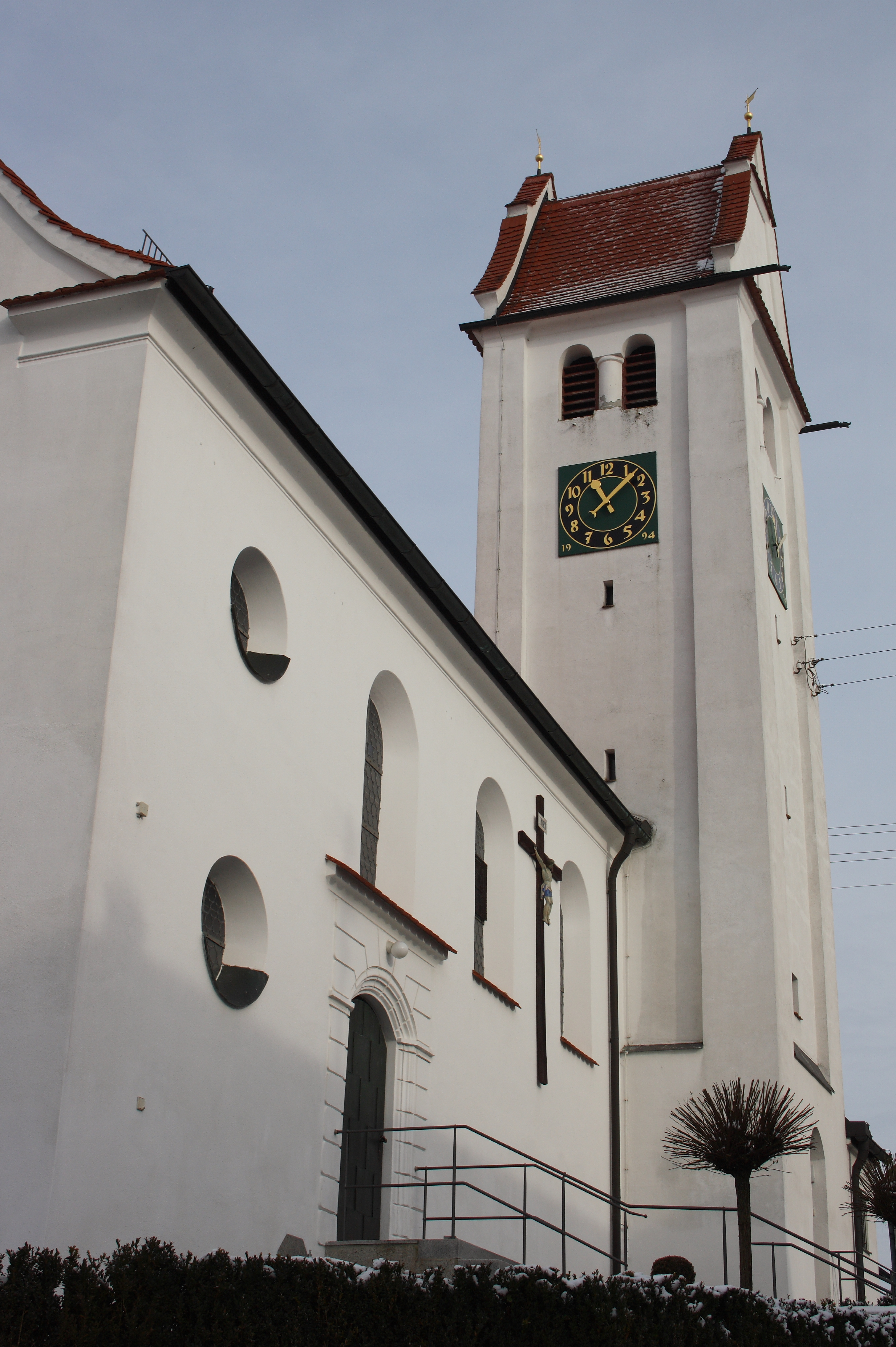 Katholische Filialkirche St. Johann Baptist in Mönstetten, einem Ortsteil von Dürrlauingen